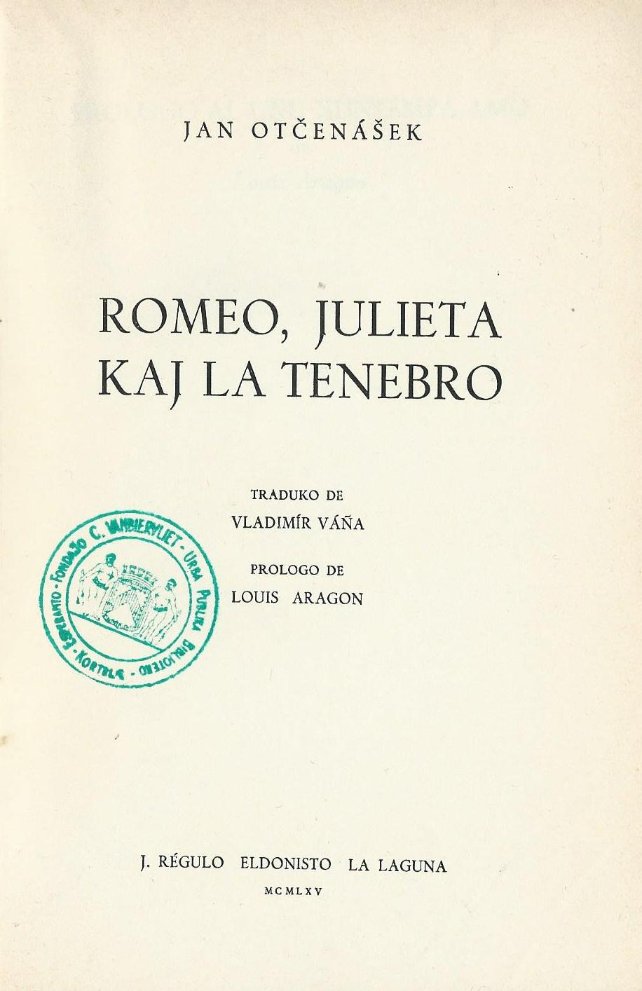 librokovrilo de "Romeo, Julieta kaj la Tenebro", 1965